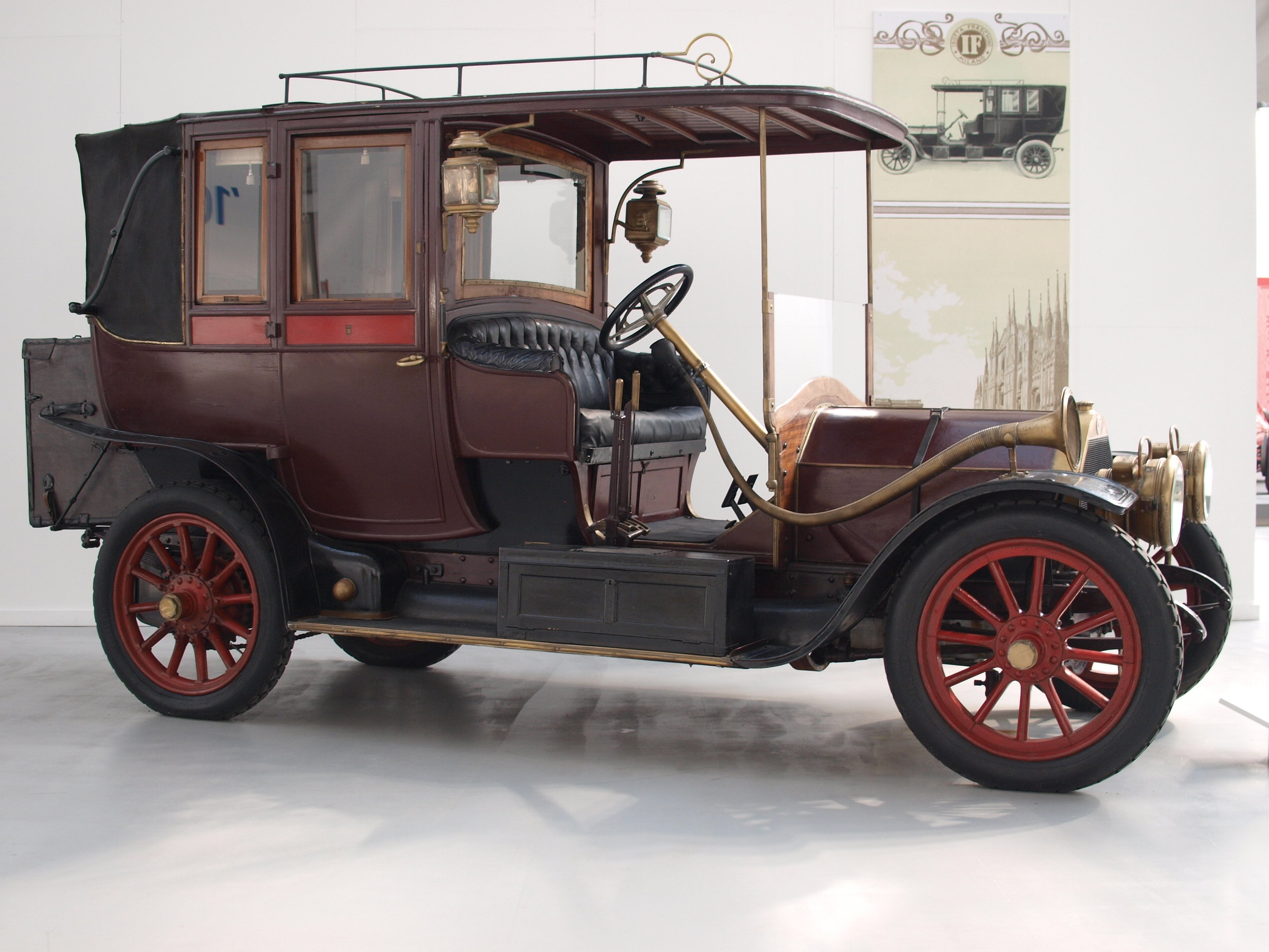 Isotta-Fraschini AN 20/30 - Italy 1909 L'evoluzione dell'automobile